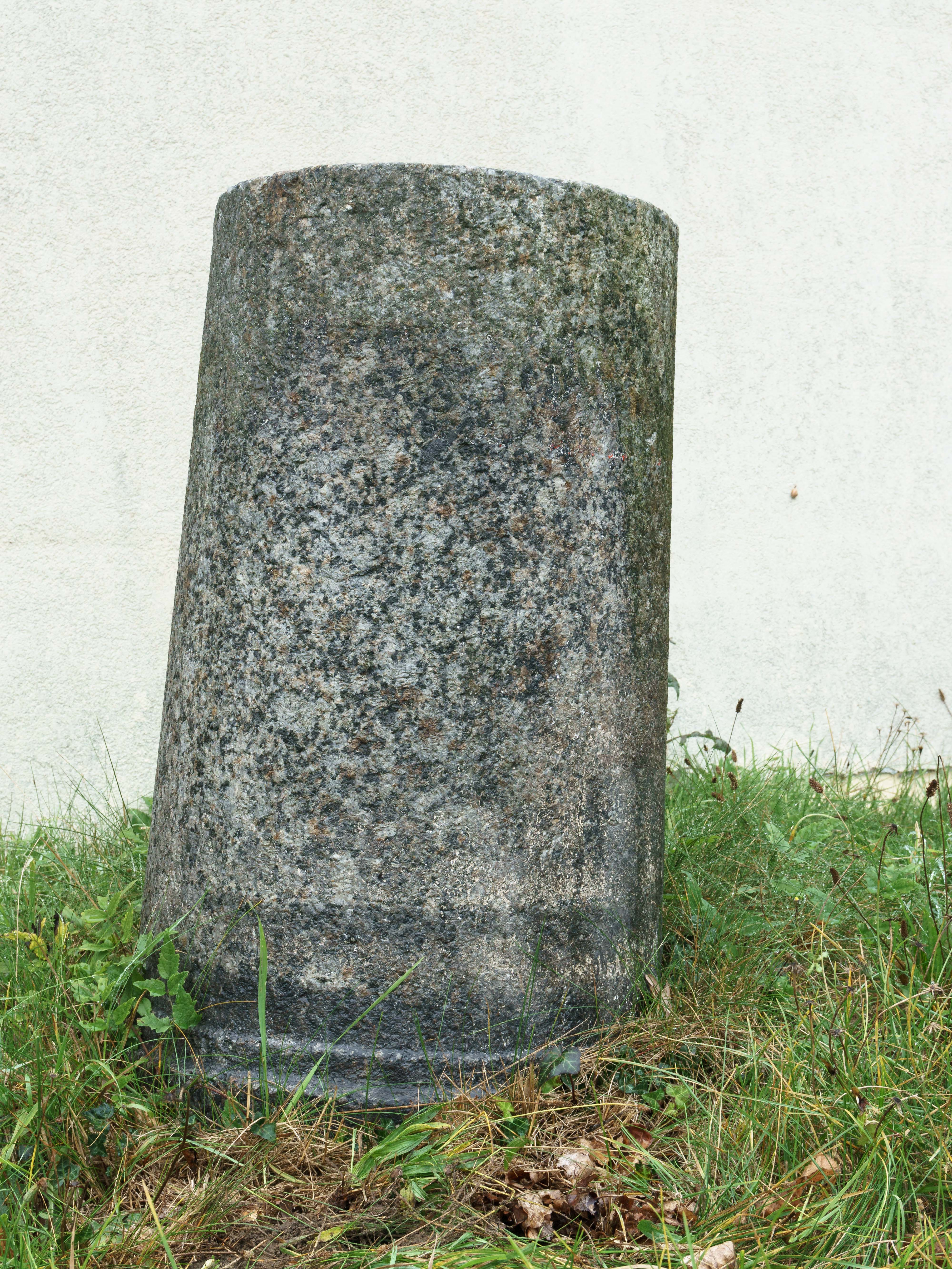 Preußischer Rundsockelstein (0948) an der Osterburger Straße in Osterburg (Altmark) OT Erxleben